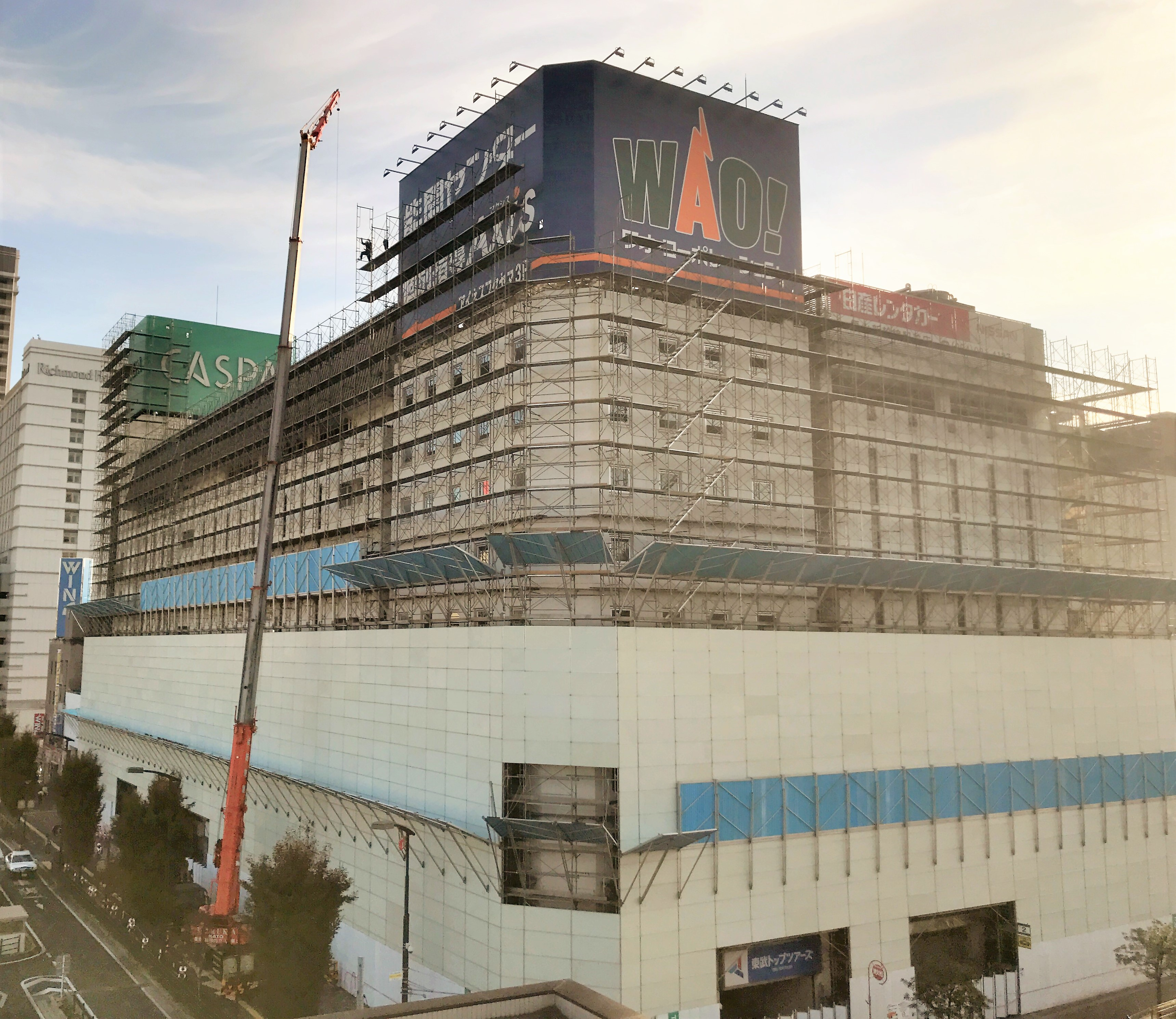 解体中のキャスパ及びと～ぶホテル。2019年11月。福山駅新幹線ホームより撮影。